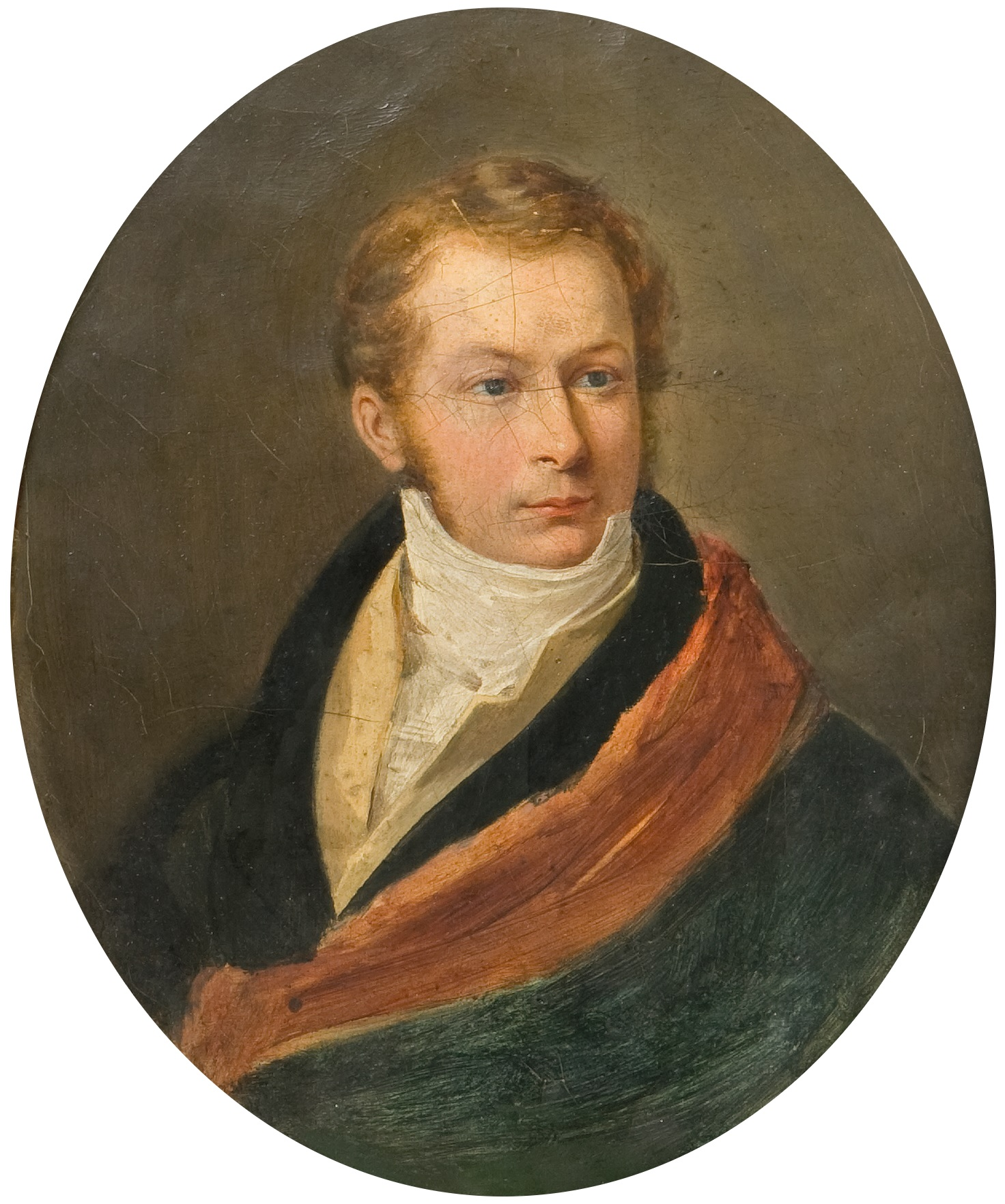 Leon Potocki (1790-1860)